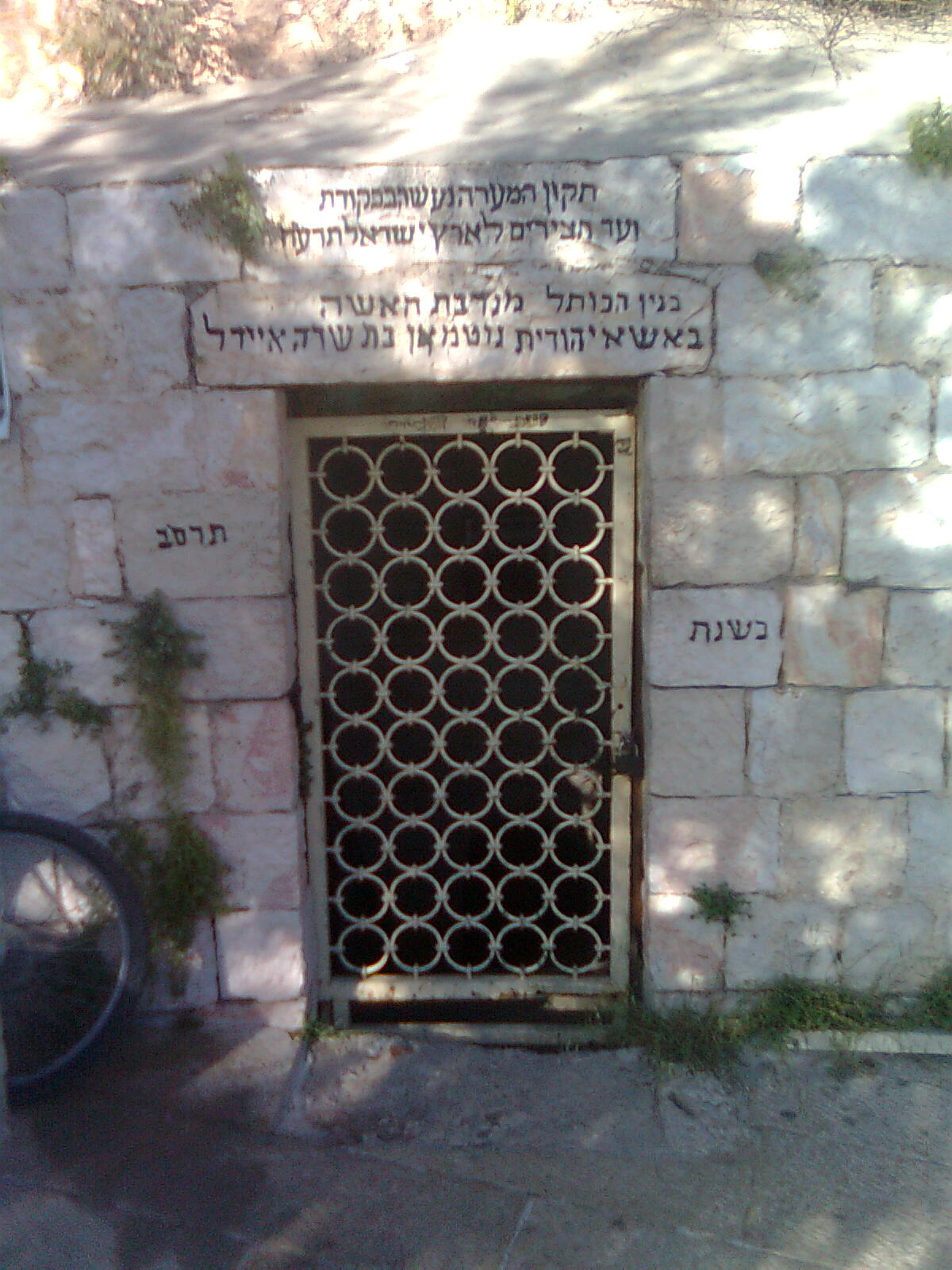 מערת הסנהדרין הקטנה